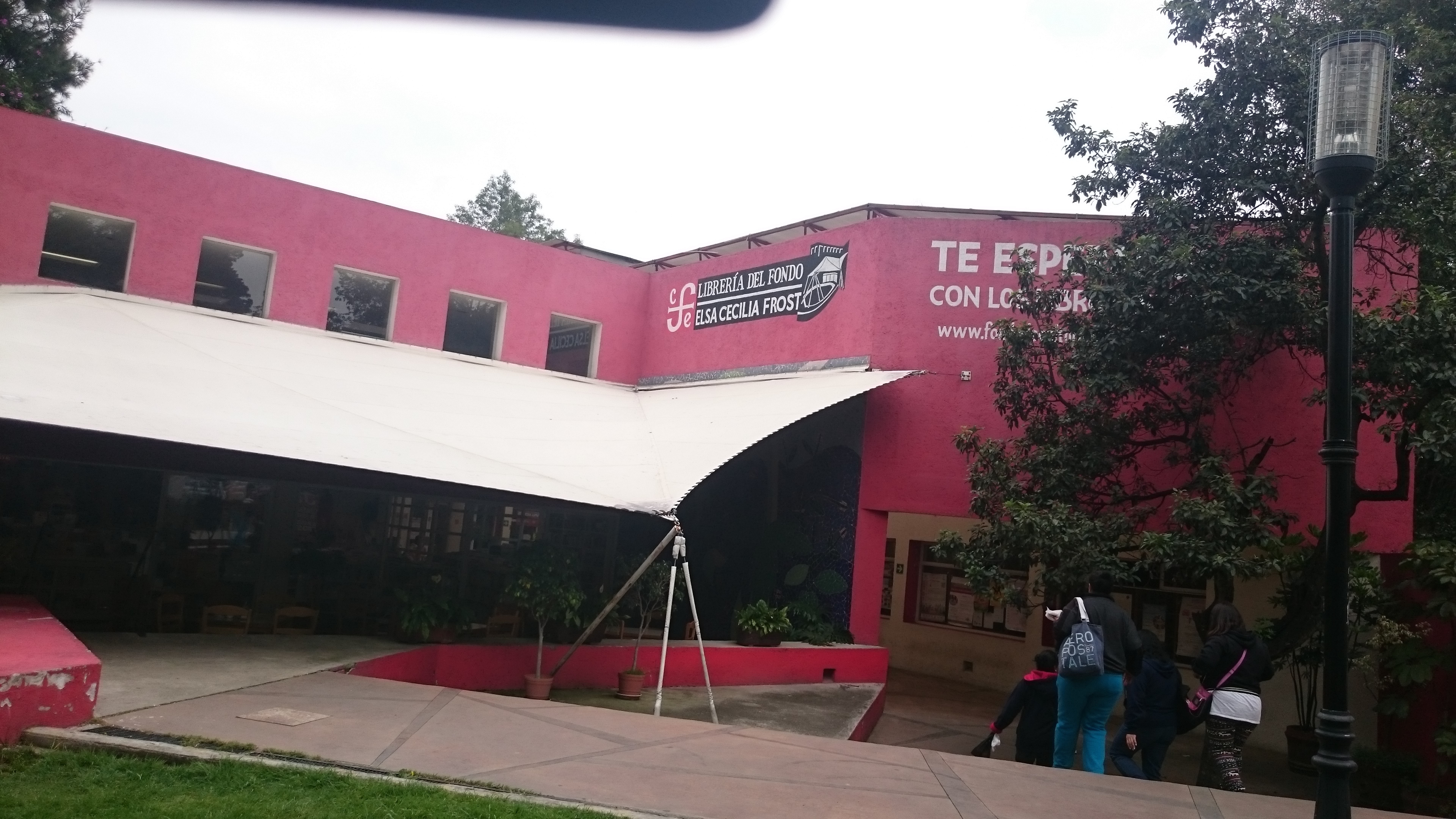 Vista exterior del edificio donde se encuentran la Biblioteca Central y el Fondo de Cultura Económica Foto tomada en la Biblioteca Central, Ubicada en Tlalpan (Junto al Centro de Tlalpan)